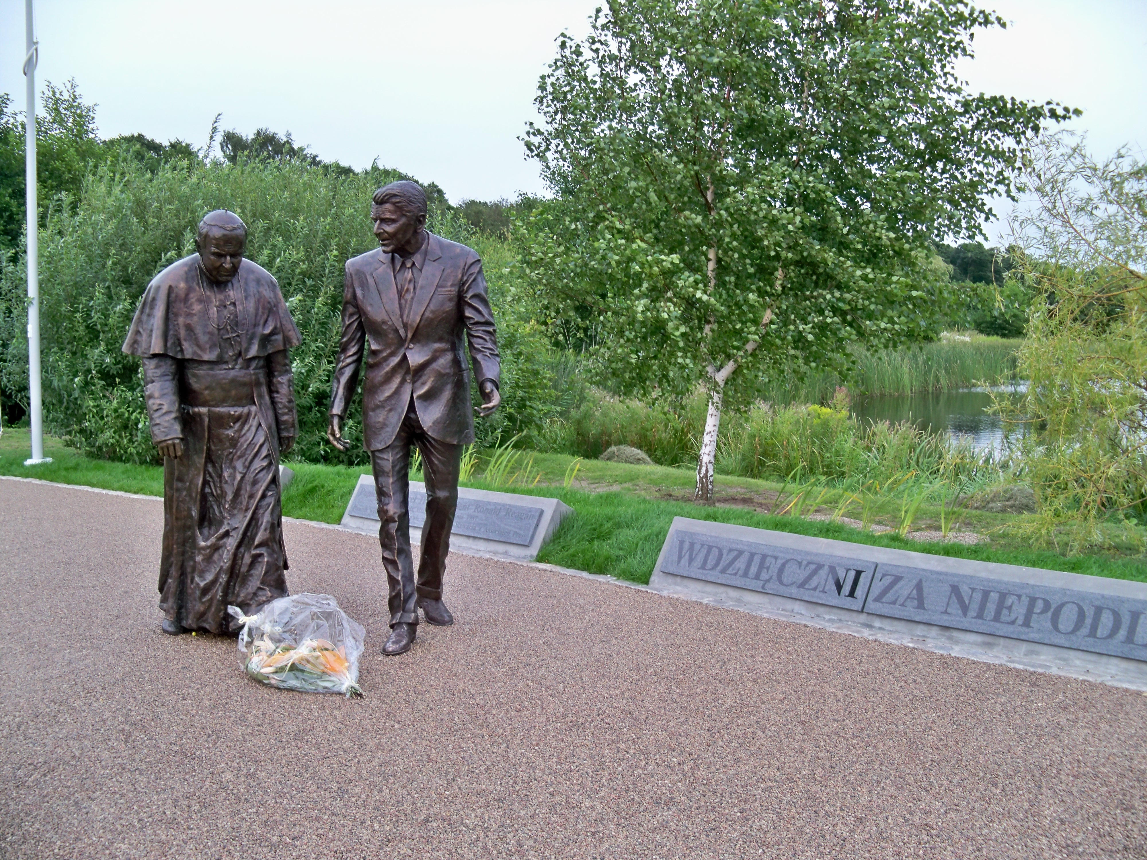 Pomnik Jana Pawła II i Ronalda Reagana. Park Reagana, Gdańsk-Przymorze.